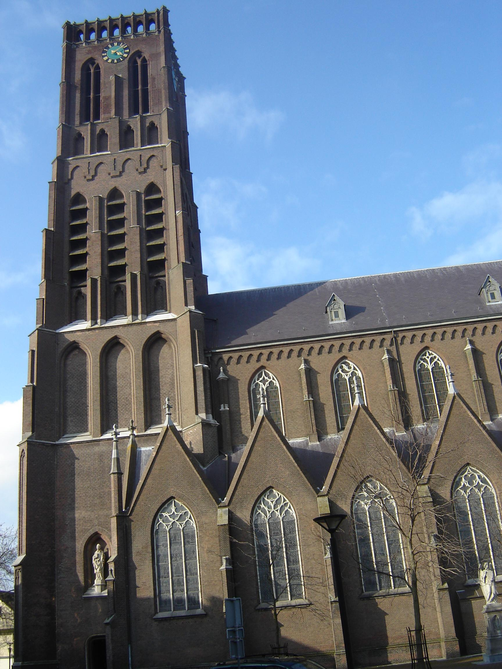 Grote Kerk ou H.Maria Onbevlekt Ontvangen Kerk à Oss.